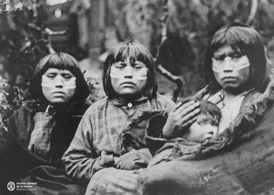 Indígenas yaganes en Cabo de Hornos 1883.